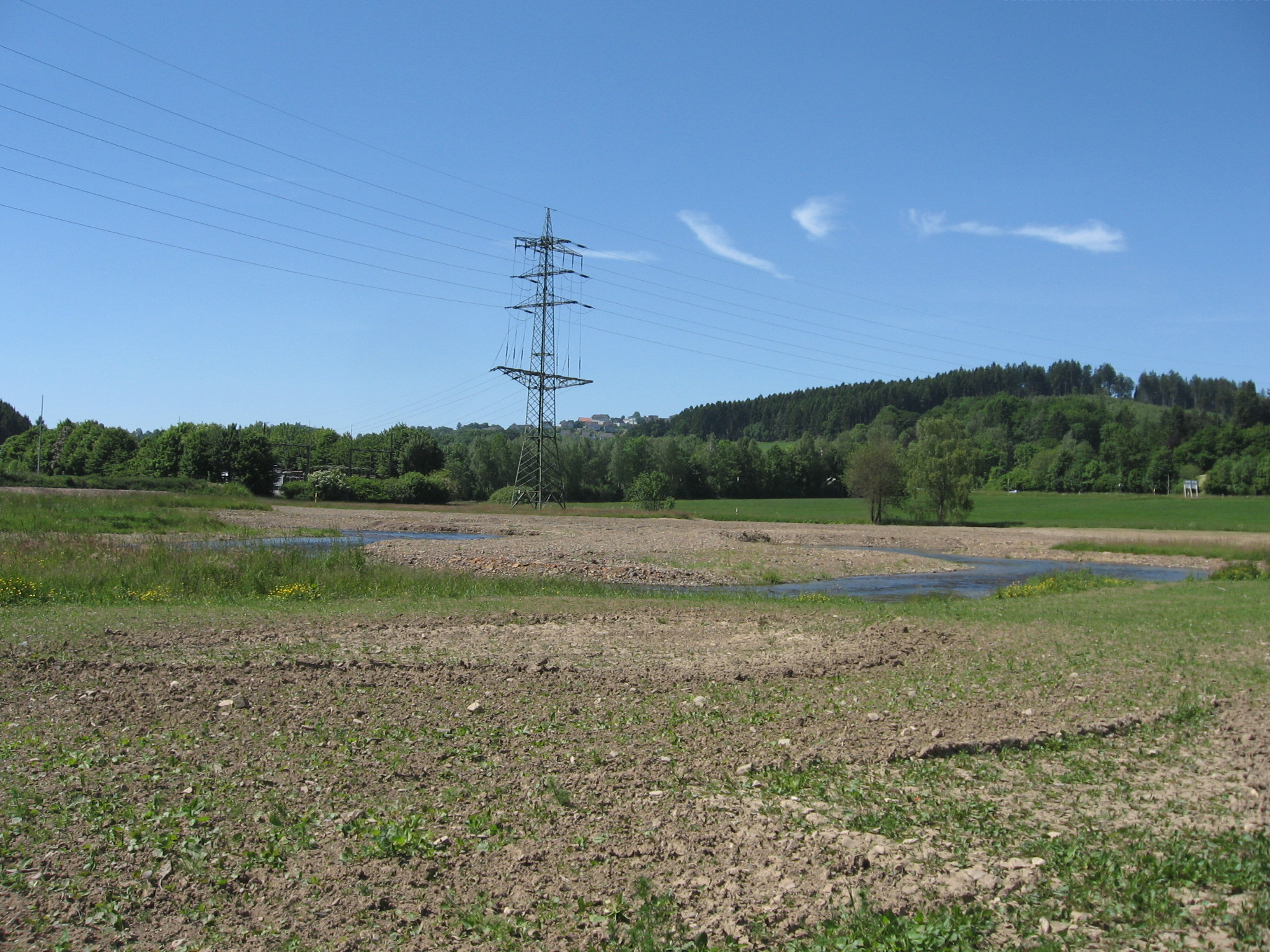 Landschaftsschutzgebiet Sorpewiesen Lange Erlen nach Fertigstellung der Renaturierung Winter 2014/15.